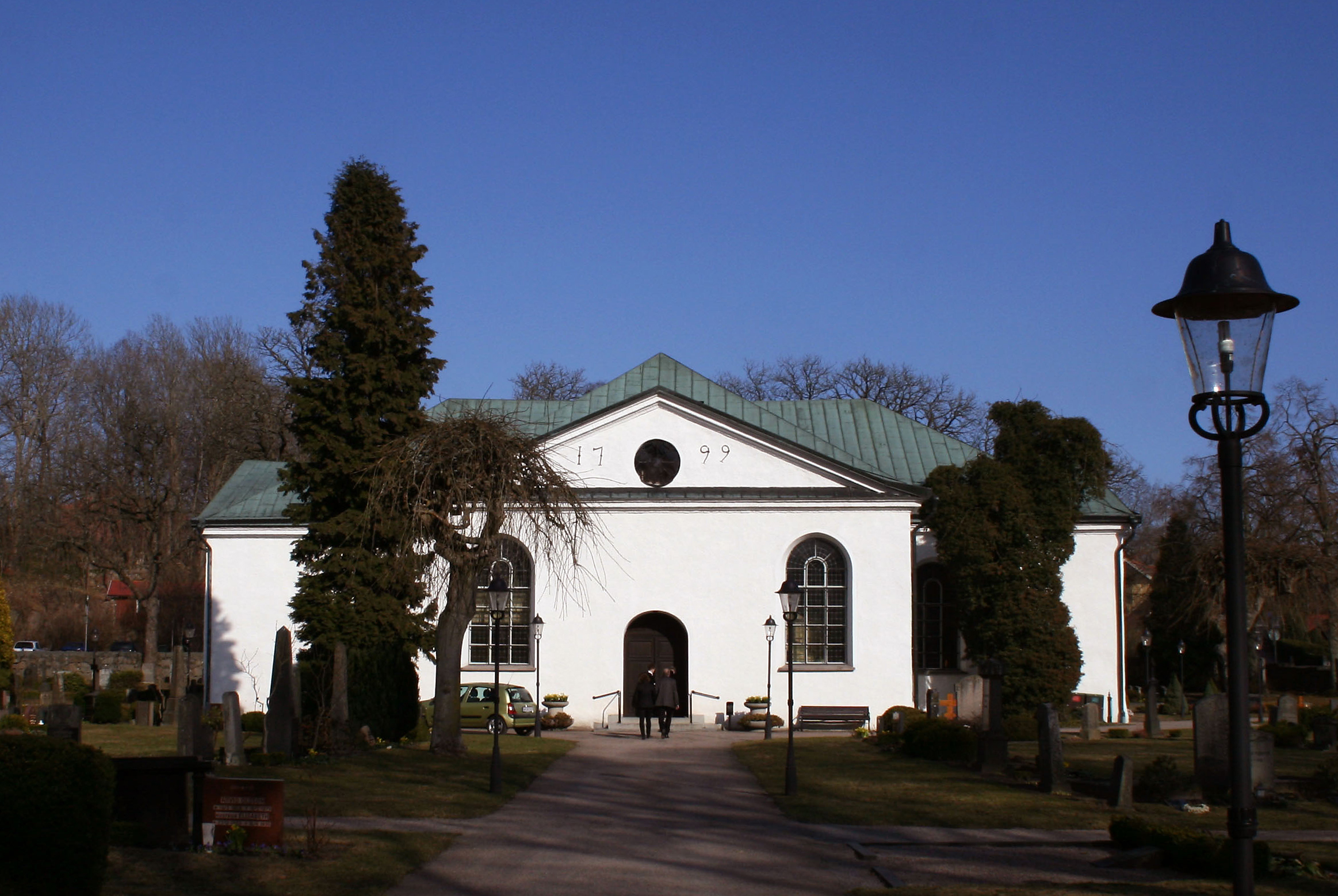 Asarums kyrka i Asarum utanför Karlshamn